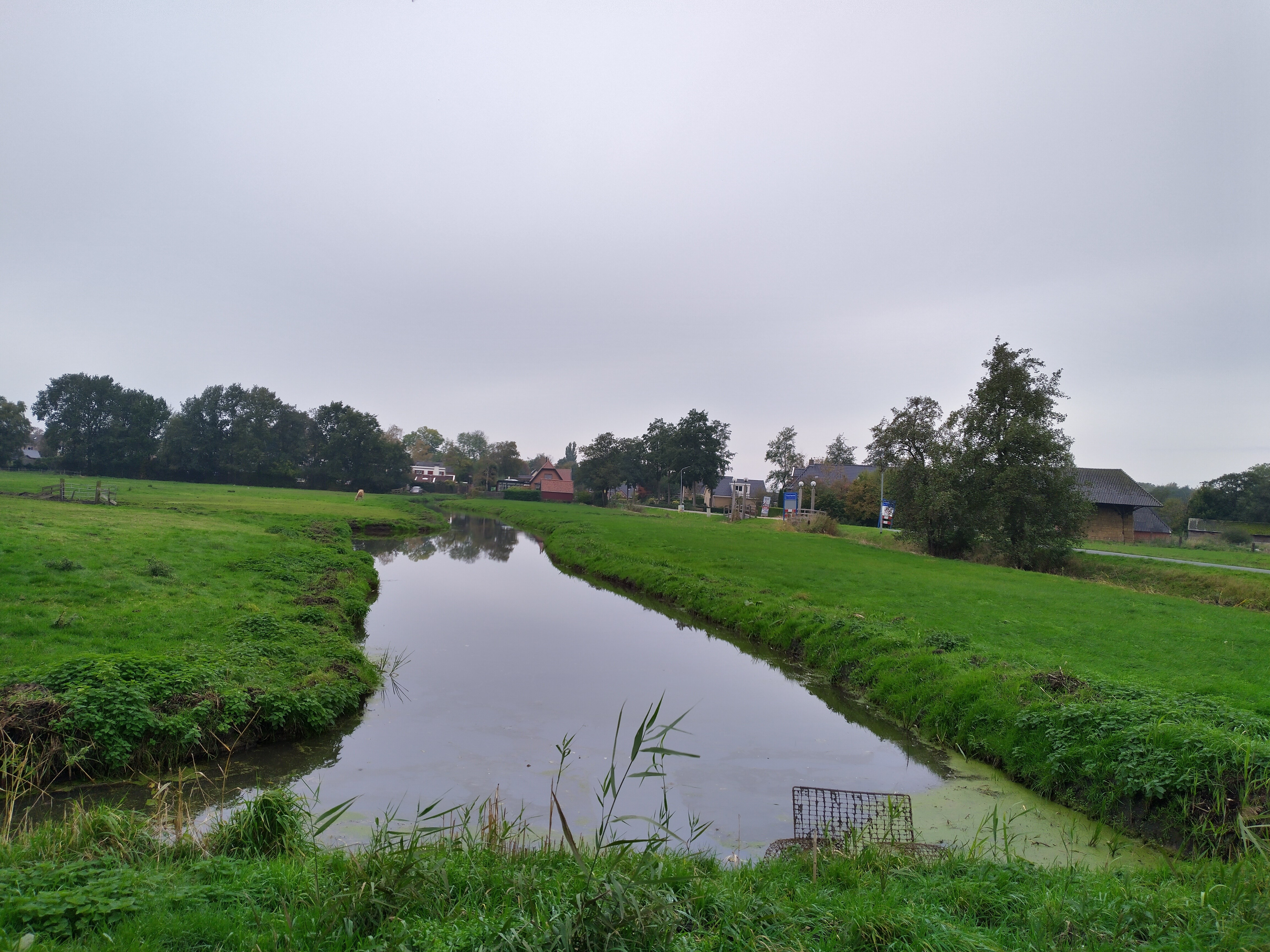 Het riviertje de Gave ten oosten van Oostwold, Westerkwartier, Groningen.